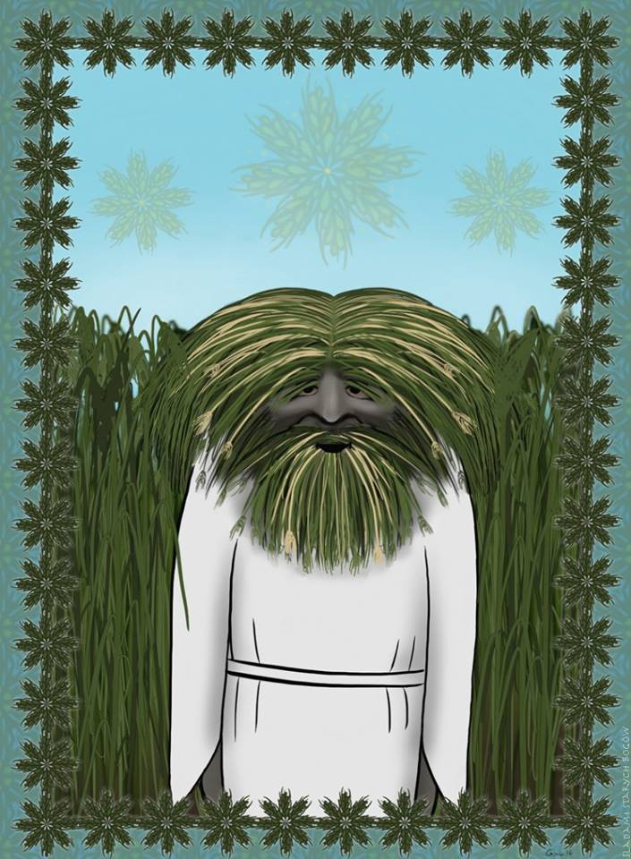 Polewik, opiekun pól